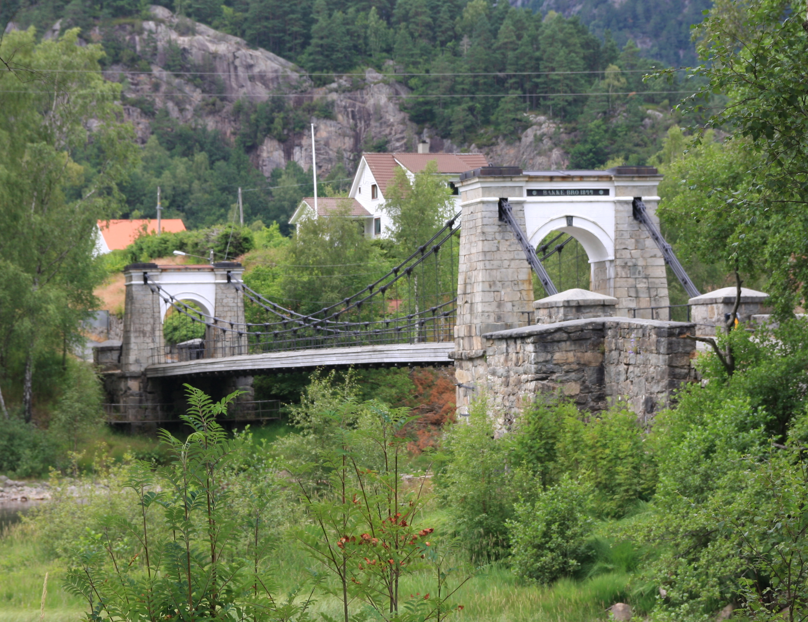 Bakke bro